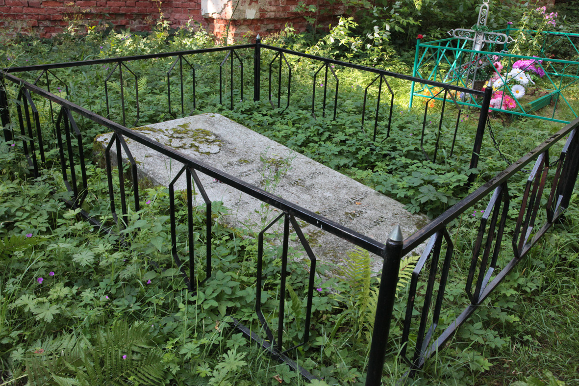 снято в походе. Могила Петра Александровича Гейдена в селе Глубоком Опочецкого района